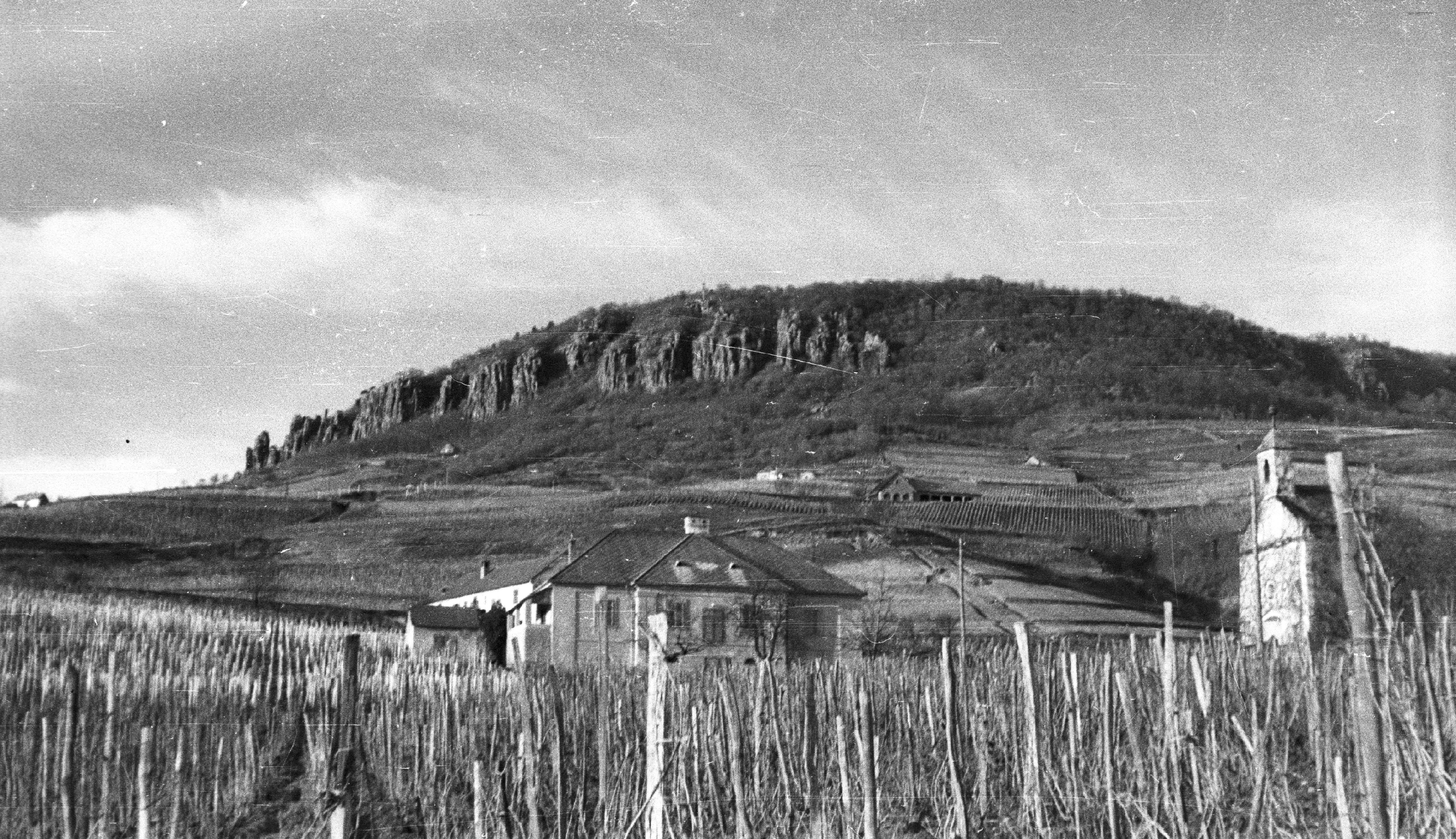 Szent Anna-kápolna, a hegyoldalban a Bormúzeum épülete. Location: Hungary, Badacsony, Lake Balaton Title: Szent Anna-kápolna, a hegyoldalban a Bormúzeum épülete.